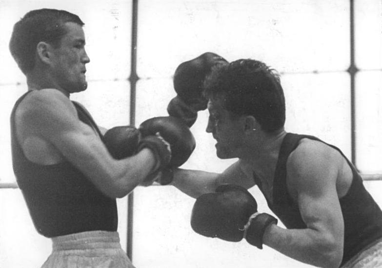 Hans Freistadt, Otto Babiasch Zentralbild Studré 31.5.1964 Schwerin: Olympia-Ausscheidungskämpfe im Boxen In der Schweriner Sport- und Kongress-Halle wurden am 30.5.64 die ersten fünf Box-Fahrkarten nach Tokio verteilt. Mit Otto Babiasch, Heinz Schulz, Heiko Winter und Jürgen Schlegel qualifizierten sich bereits 4 DDR-Boxer für das olympische Turnier. Den 5. Platz erkämpfte sich der westdeutsche Paul Hogh. UBz: Durch eine starke Schlußrunde blieb Fliegengewichtler Otto Babiasch (DDR, rechts) über Hans Freistadt (DABV) mit 2:1 Richterstimmen knapper Punktsieger.